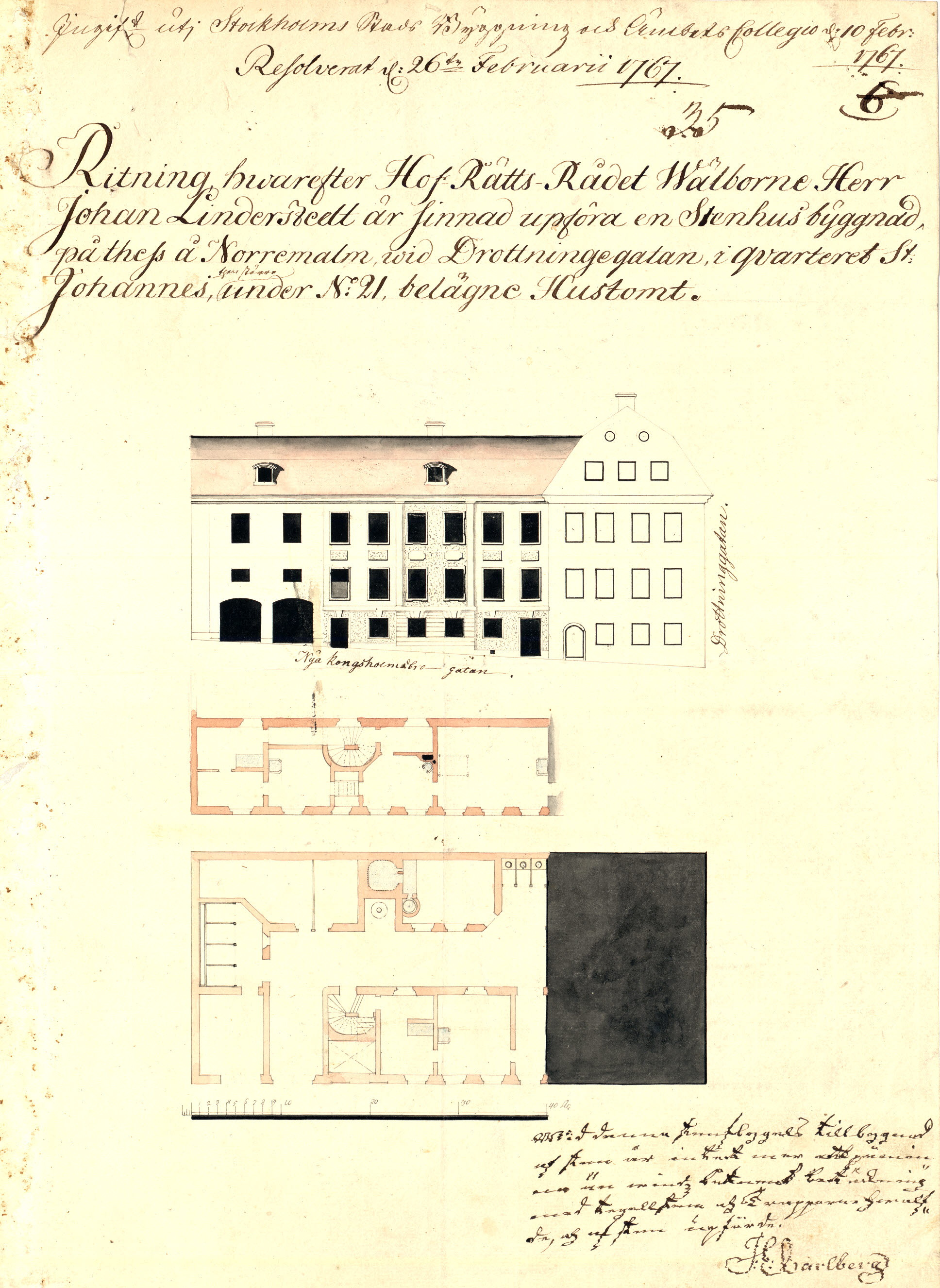 Bygglovsansökan för tillbyggnad av Kanngjutarmästarens hus mot Jakobsgatan, 27 februari 1767.